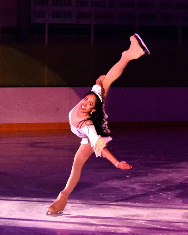 Ami Parekh